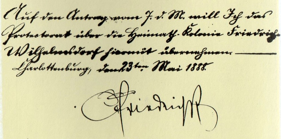 Protektoratserklärung Kaiser Friedrich III vom 23. Mai 1888 für die Kolonie "Friedrich-Wilhelms-Dorf" in Düring